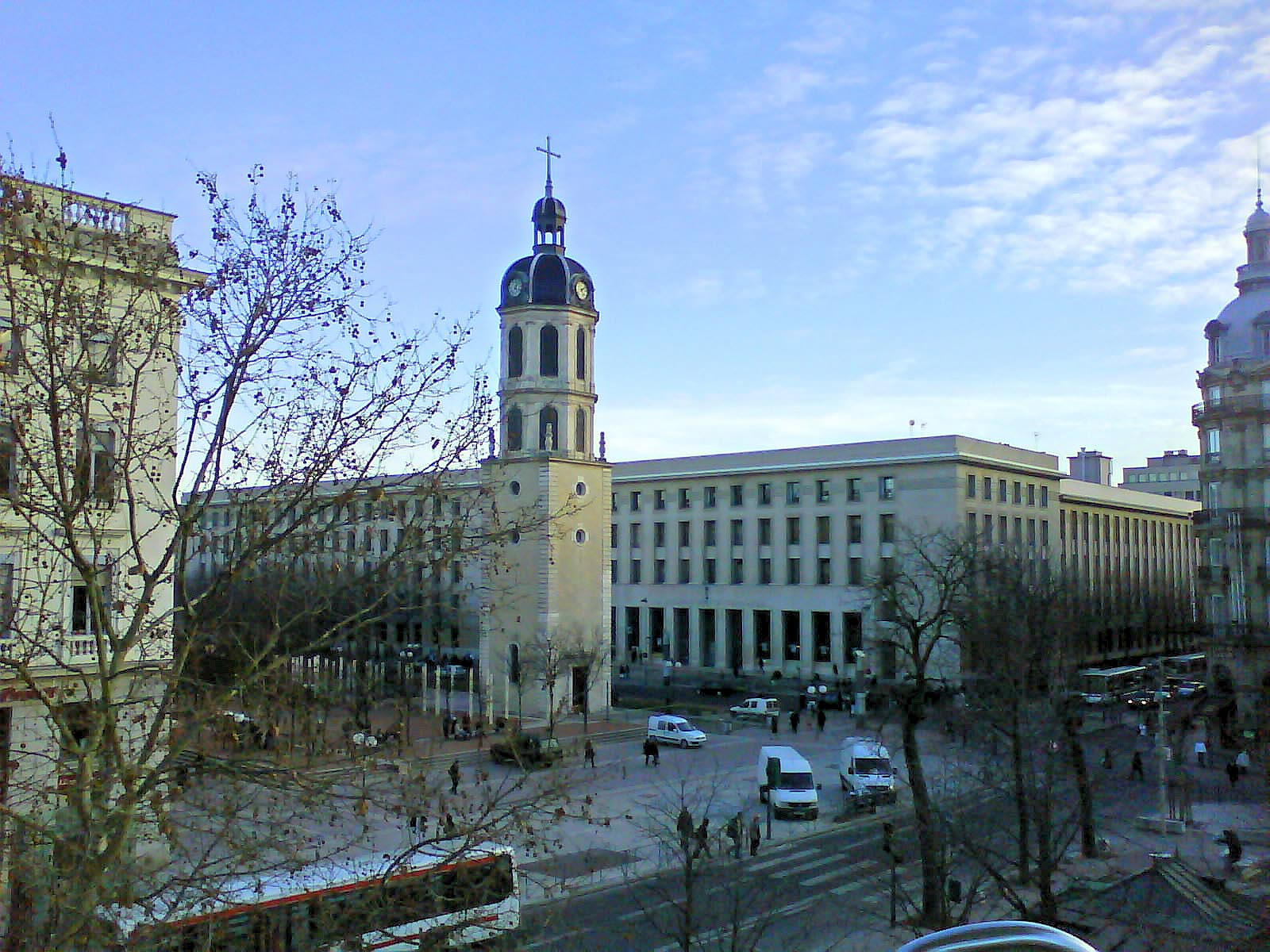 vue sur la place Antonin Poncet Lyon France. Photo prise de la grande roue